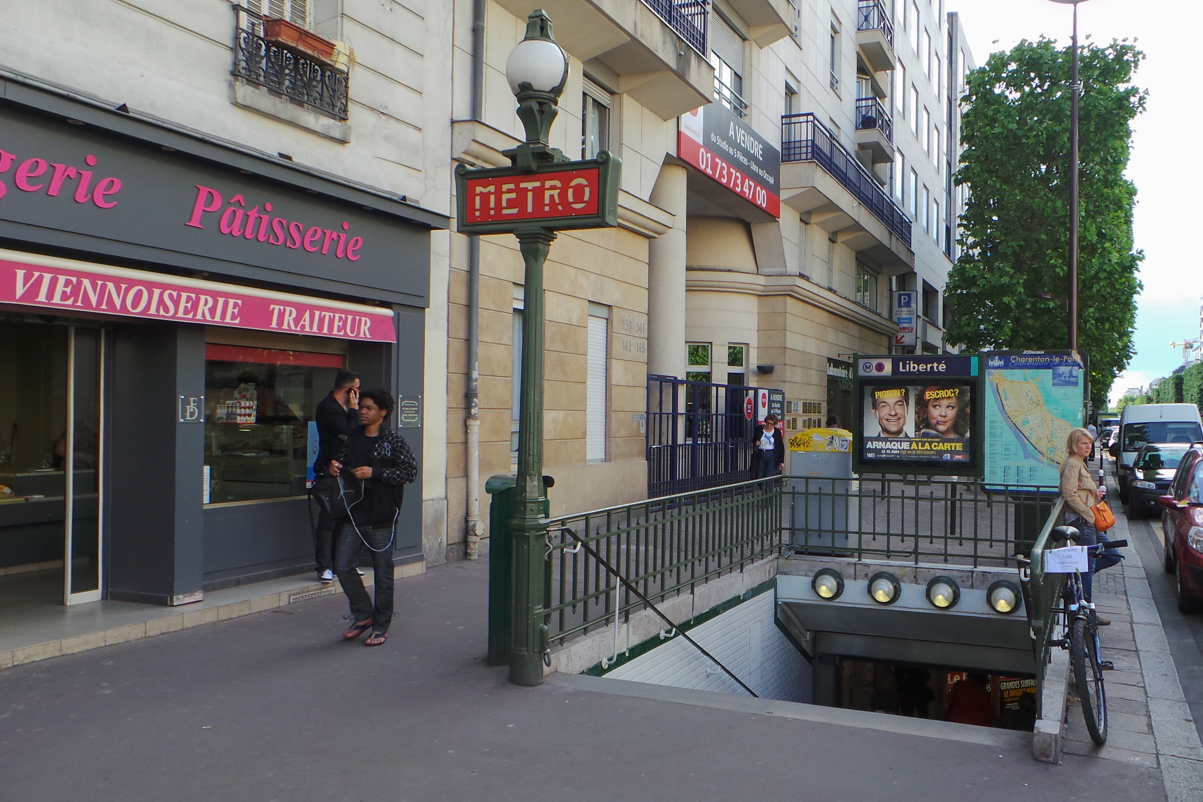 Station de métro Liberté, ligne 8 du métro de Paris - Charenton-le-Pont, Val-de-Marne, France